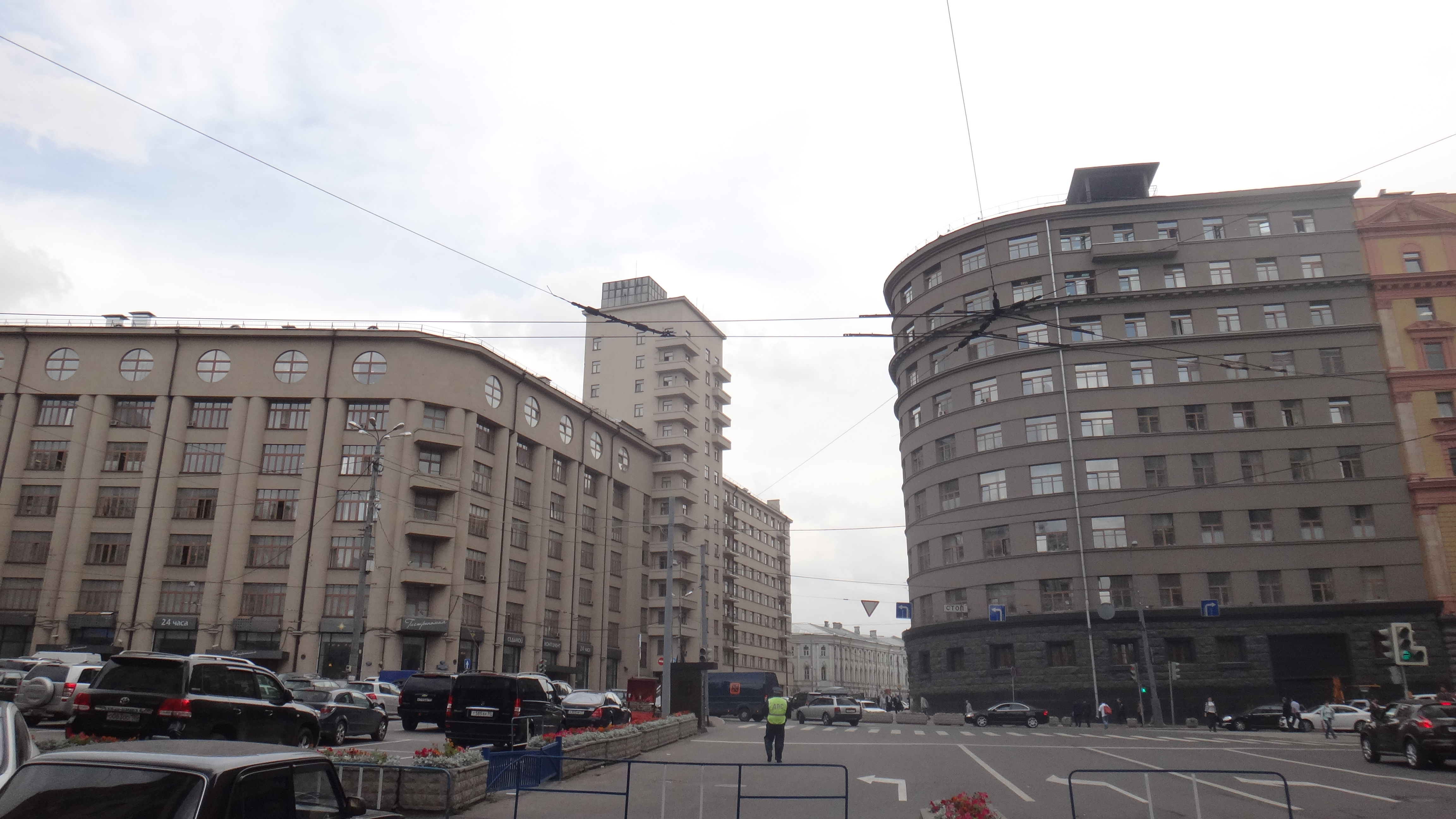 Большая Лубянка, угол Фуркасовского (налево) и Кузнецкого моста. В центре-слева здание "Динамо"